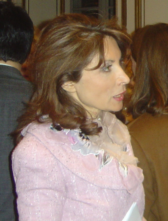 Monique Canto-Sperber